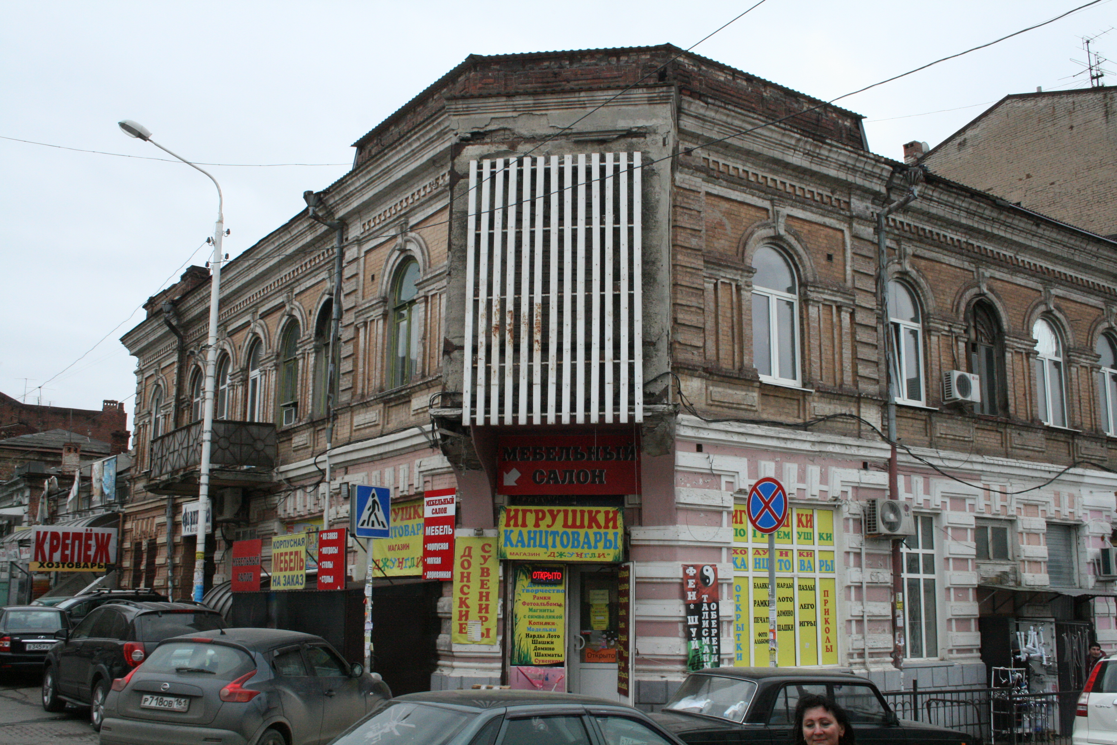 Дходный дом Ф. И. Мыльцына (Ростовская область, Ростов-на-Дону, Обороны улица, 48/18; Семашко переулок)